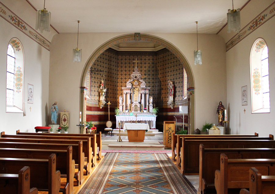 Blick ins Innere der katholischen Kirche St. Remigius in Leidingen, Gemeinde Wallerfangen, Landkreis Saarlouis, Saarland.